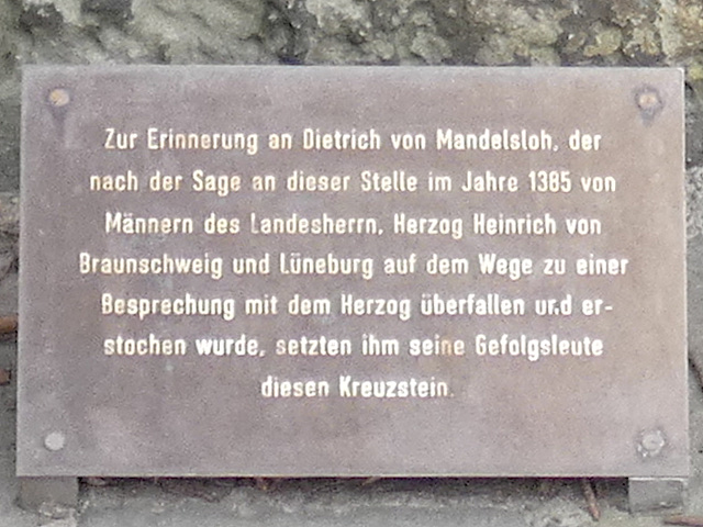 Text: Zur Erinnerung an Dietrich von Mandelsloh, der nach der Sage an dieser Stelle im Jahre 1385 von Männern des Landesherrn, Herzog Heinrich von Braunschweig und Lüneburg auf dem Wege zu einer Besprechung mit dem Herzog überfallen und erstochen wurde, setzten ihm seine Gefolgsleute diesen Kreuzstein.